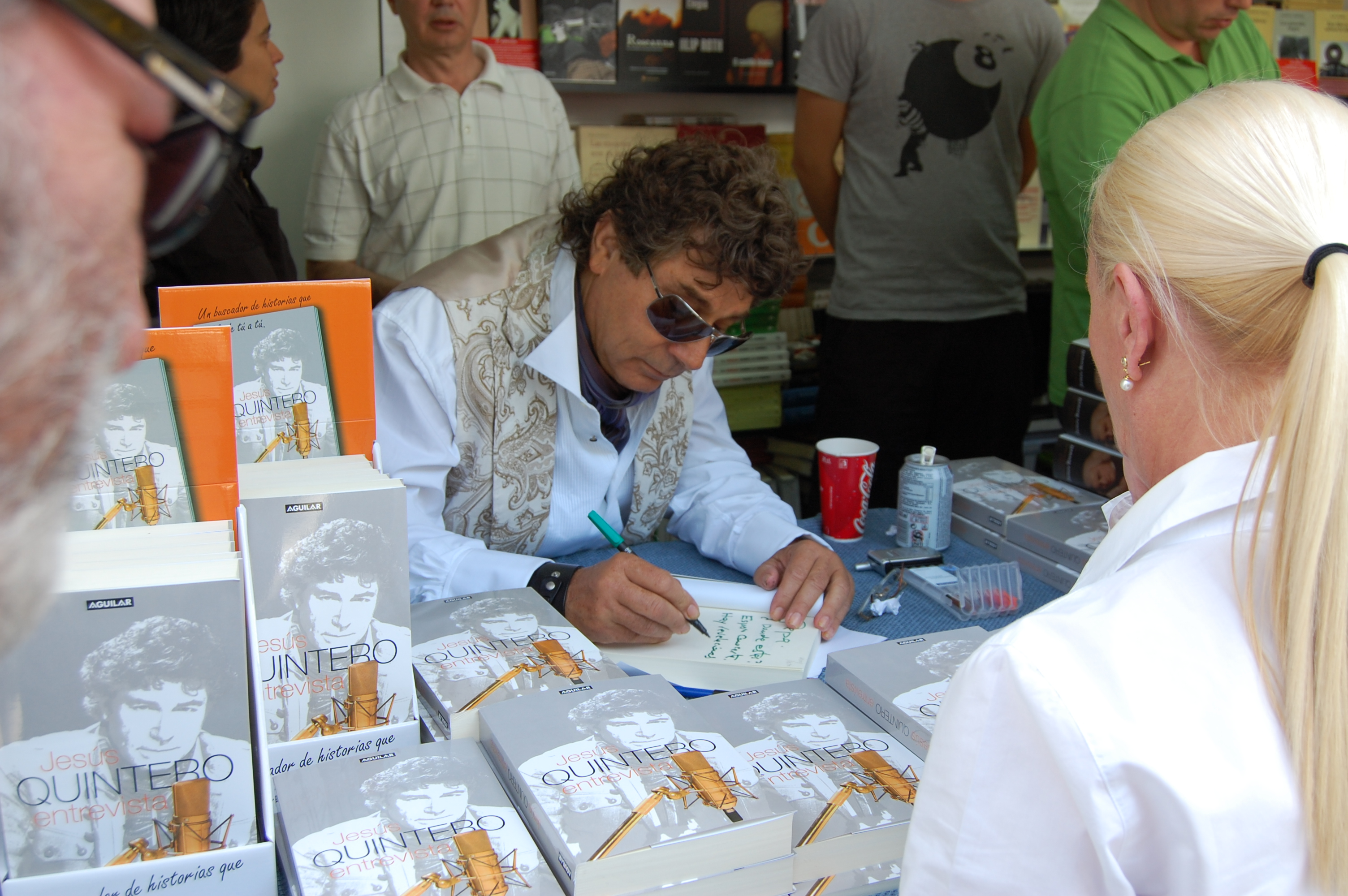 El periodista Jesús Quintero firmando en la Feria del libro de Madrid, junio de 2007.